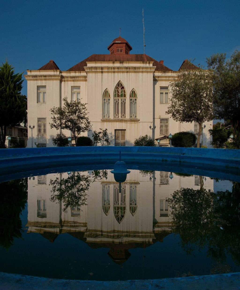 ساختمان شهرداری/ موزه بابل